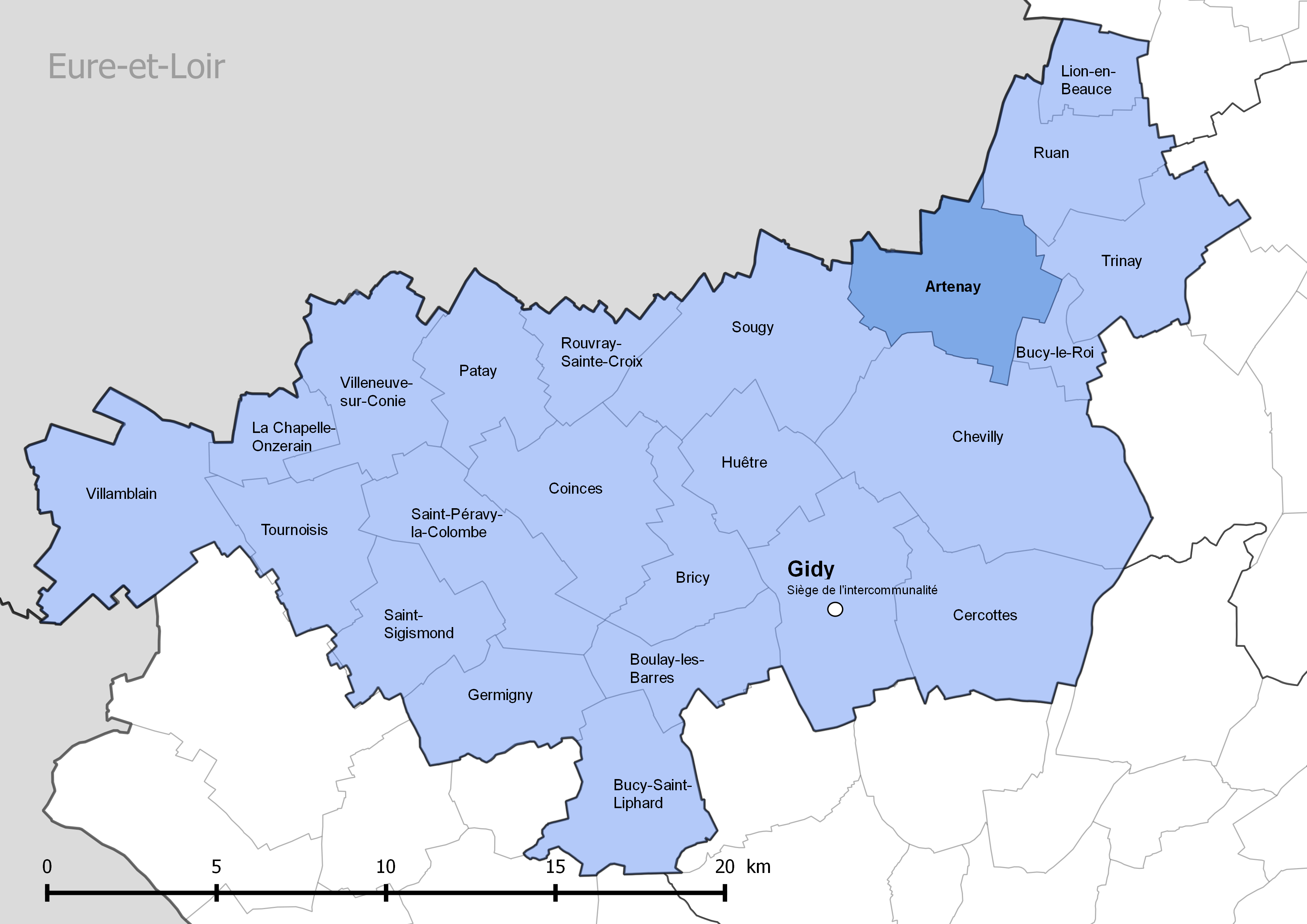 Périmètre de la communauté de communes de la Beauce loirétaine - Situation de la commune d'Artenay